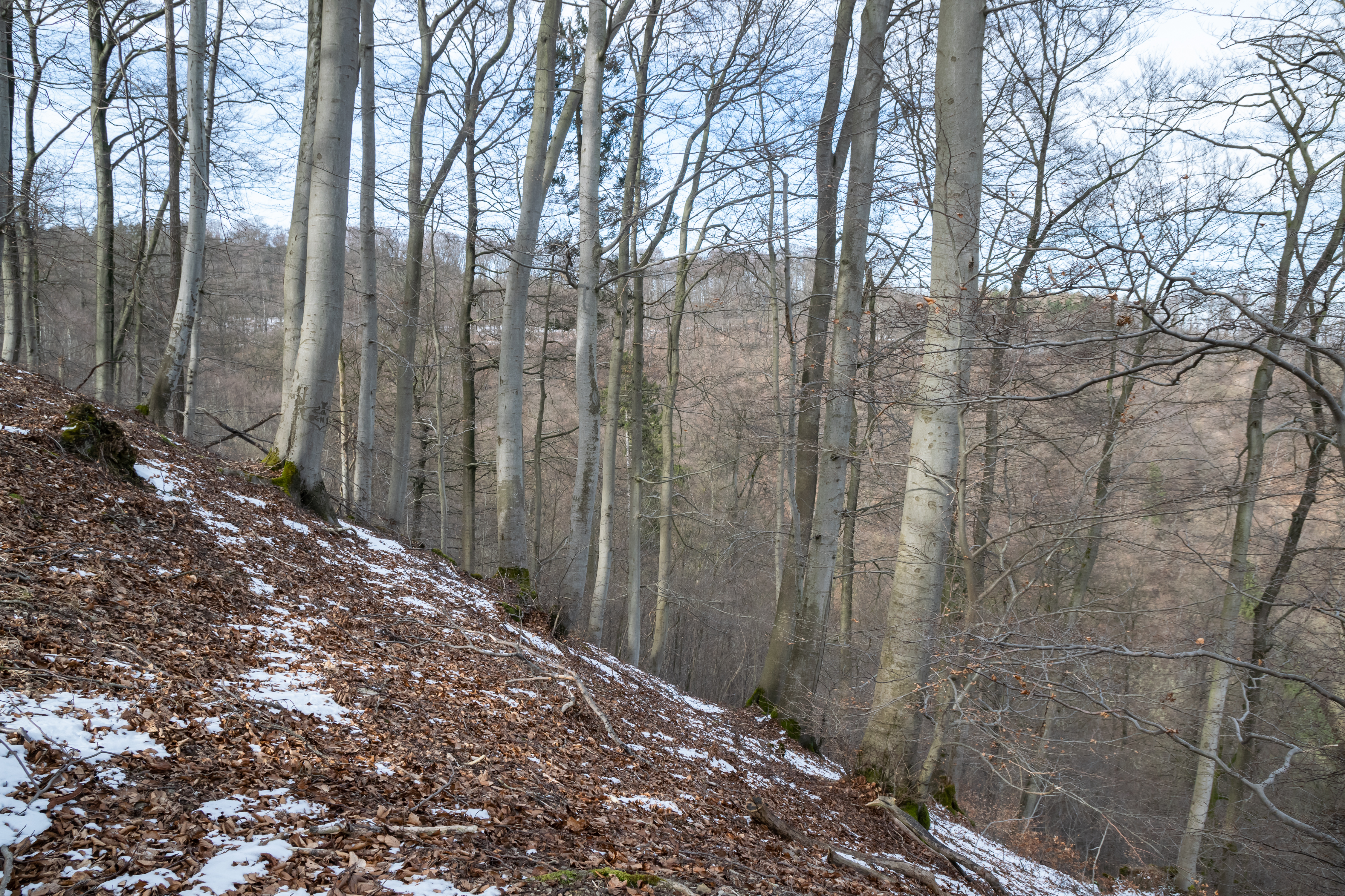 Naturschutzgebiet Teufelschlucht am Weinberg bei Höxter, Kreis Höxter